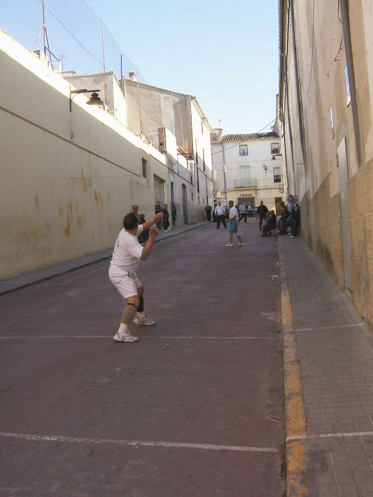 Imatge d'una partida de galotxa